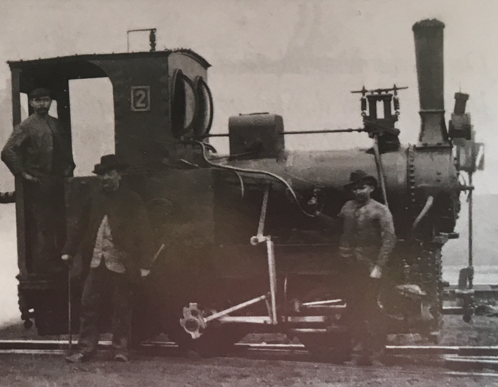 Hoesch 2 (800 mm), Krauss ?/1888 (um 1900)